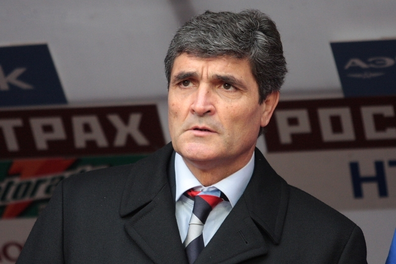 Juande Ramos.